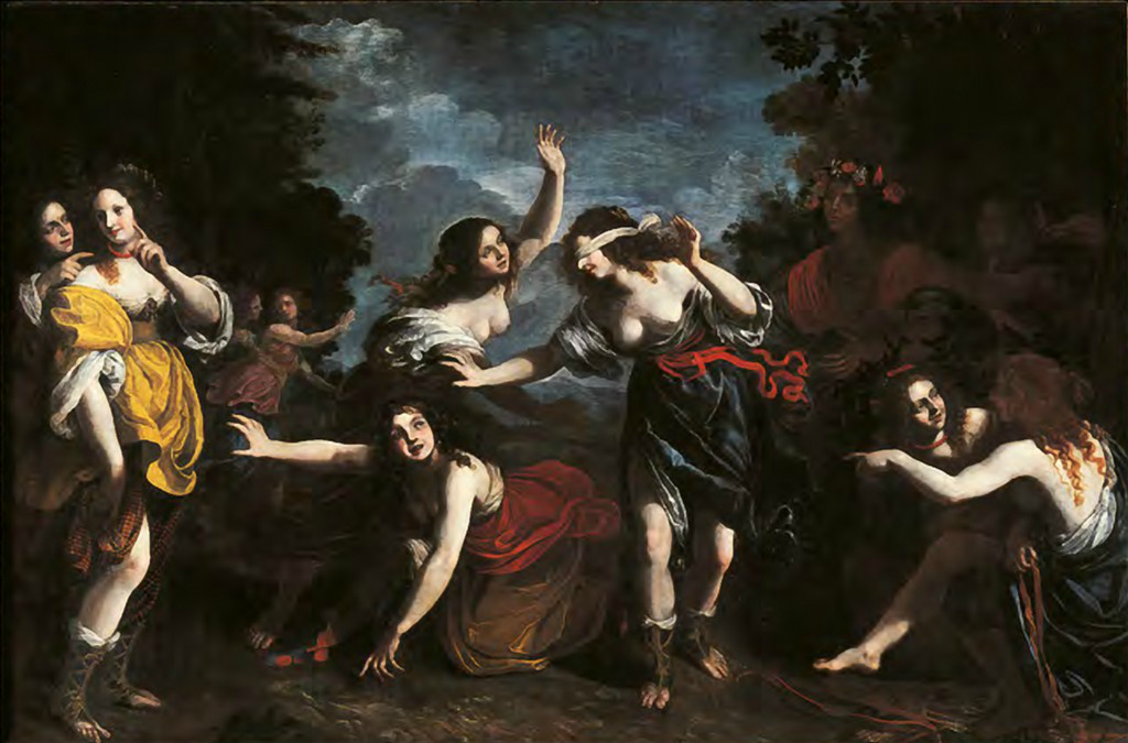 Mosca cieca con Mirtillo, Amarilli, Corisca e le ninfe. Il dipinto riprende un episodio del Pastor Fido, dramma pastorale cinquecentesco del drammaturgo ferrarese Battista Guarini